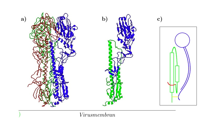 Die Ektodomäne des Influenzavirusproteins Hämagglutinin als Homotrimer, als Monomer und das Monomer als Cartoon